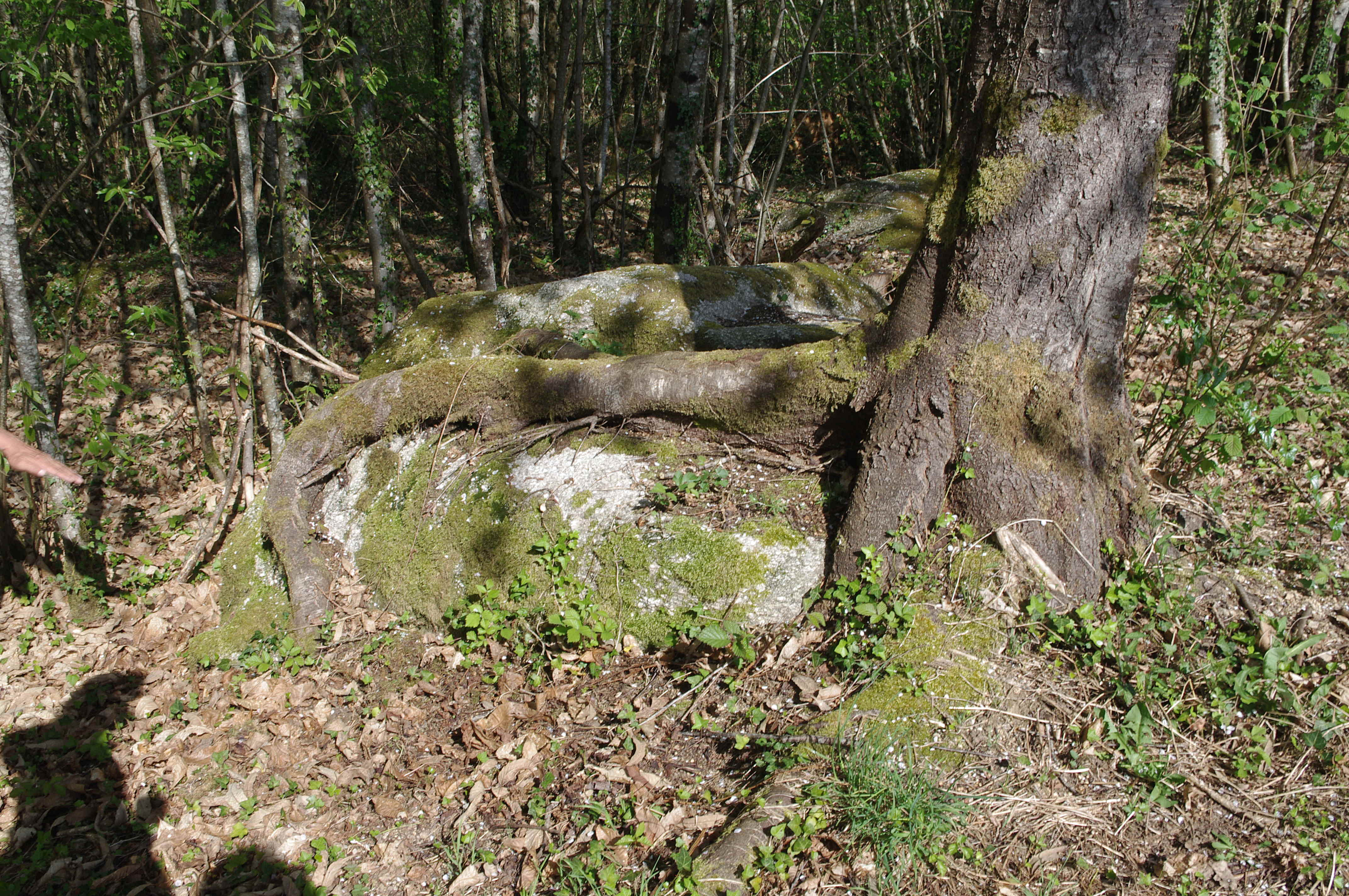 Rochers à quelques mètres du dolmen des Termisseaux, commune de Cieux, Haute Vienne